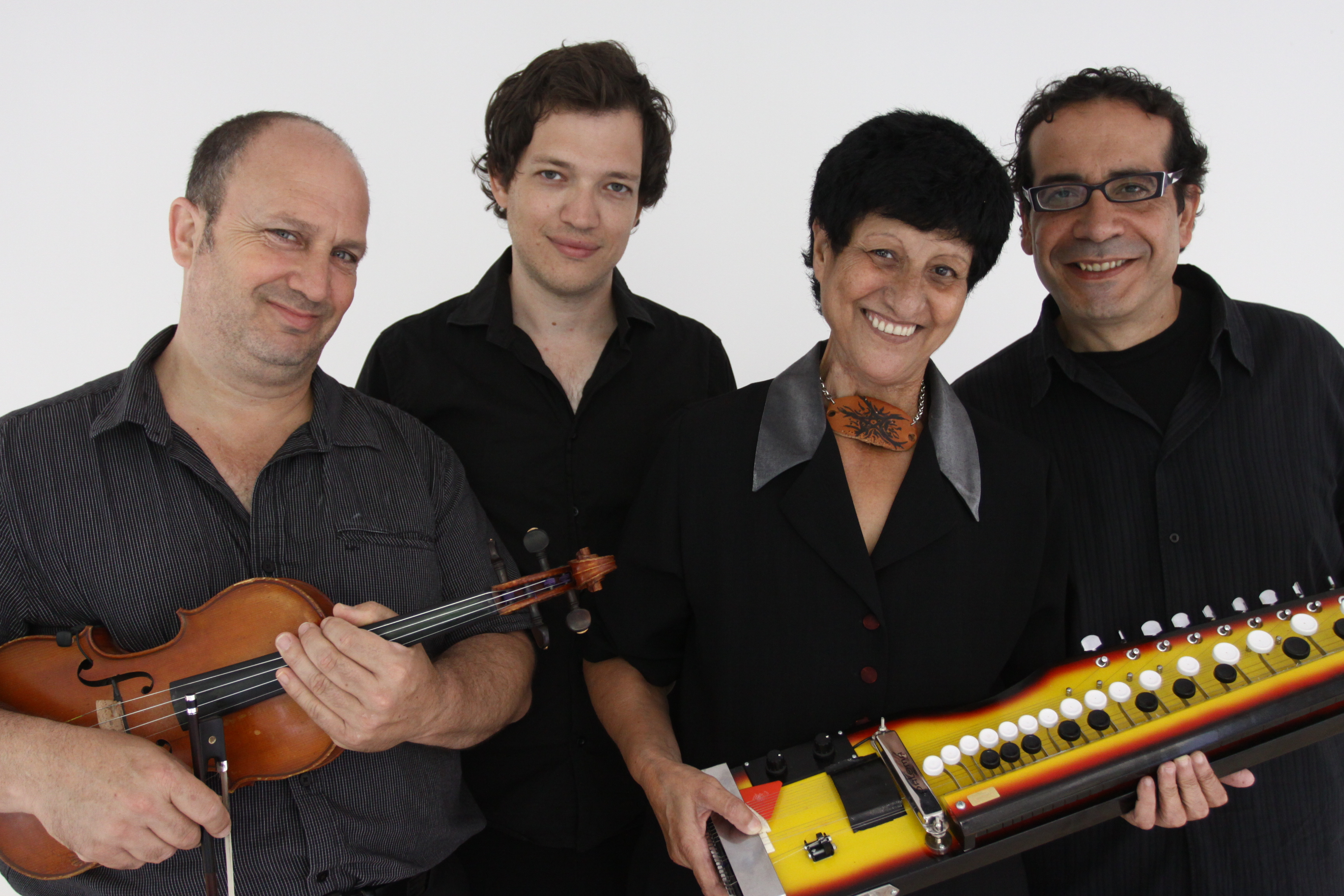 שירים באשדודית